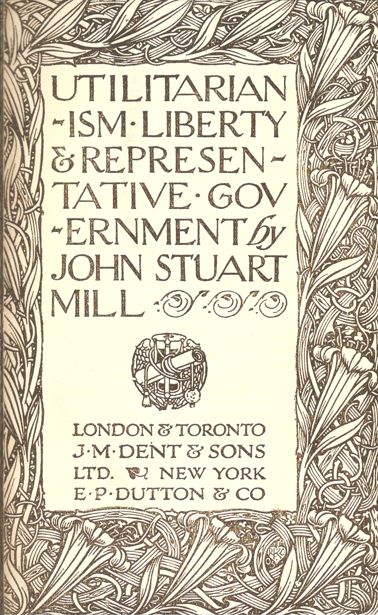 Página de título de una antología de 1910 de tres de las obras más importantes de John Stuart Mill: - Utilitarismo (1863) - Sobre la libertad (1859) - Consideraciones sobre el gobierno representativo (1861)